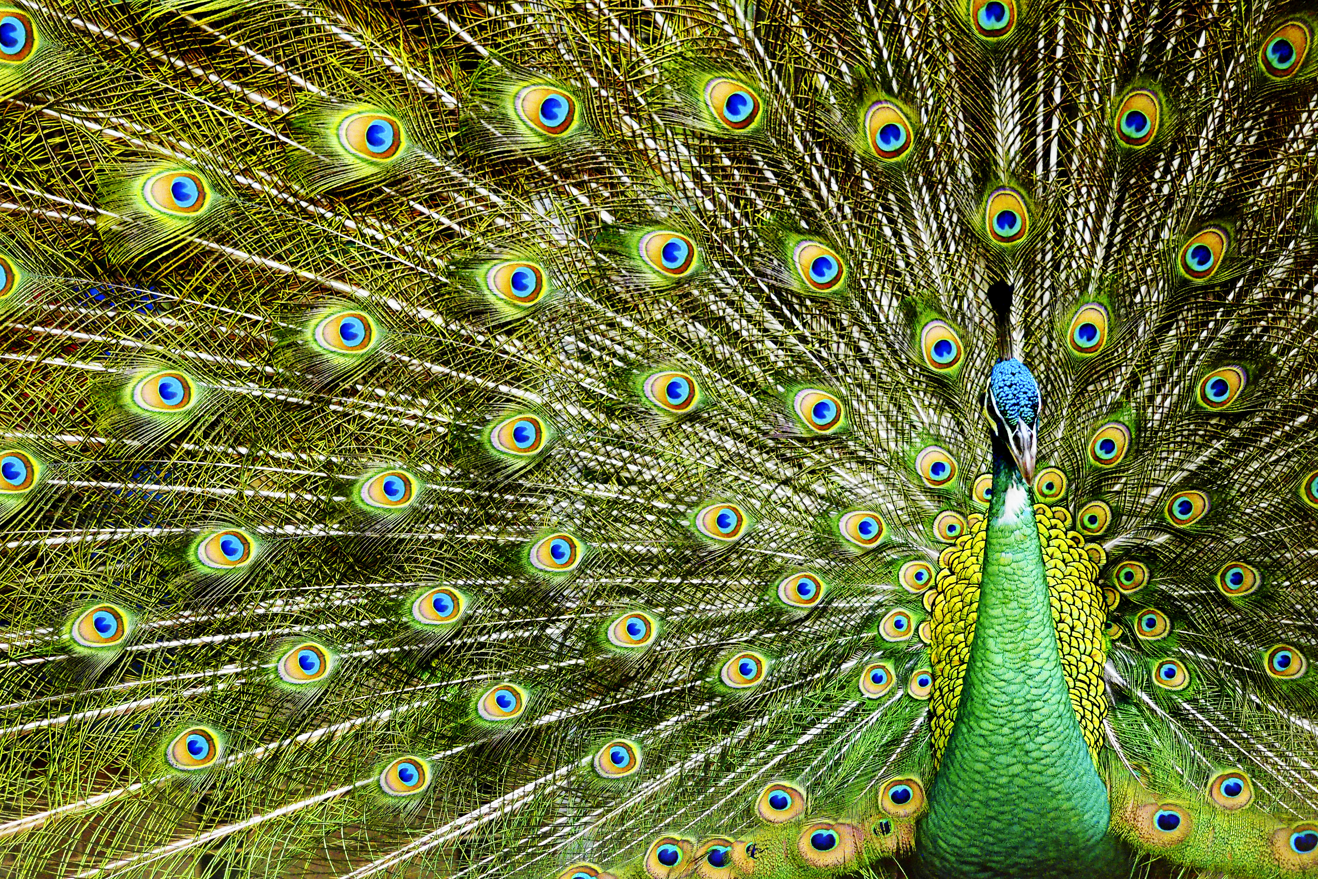 Merak hijau (Pavo muticus) adalah salah satu burung dari tiga spesies merak. Seperti burung-burung lainnya yang ditemukan di suku Phasianidae, merak hijau mempunyai bulu yang indah. Bulu-bulunya berwarna hijau keemasan. Burung jantan dewasa berukuran sangat besar, panjangnya dapat mencapai 300 cm, dengan penutup ekor yang sangat panjang.